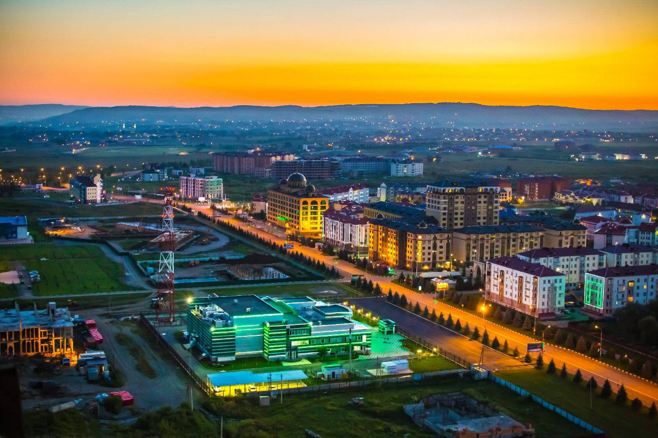 Город Магас с высоты Башни Согласия